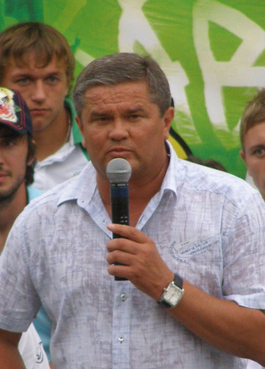 Stepan Jurtschyschyn - sowjetischer Fußballspieler und ukrainischer Fußballtrainer